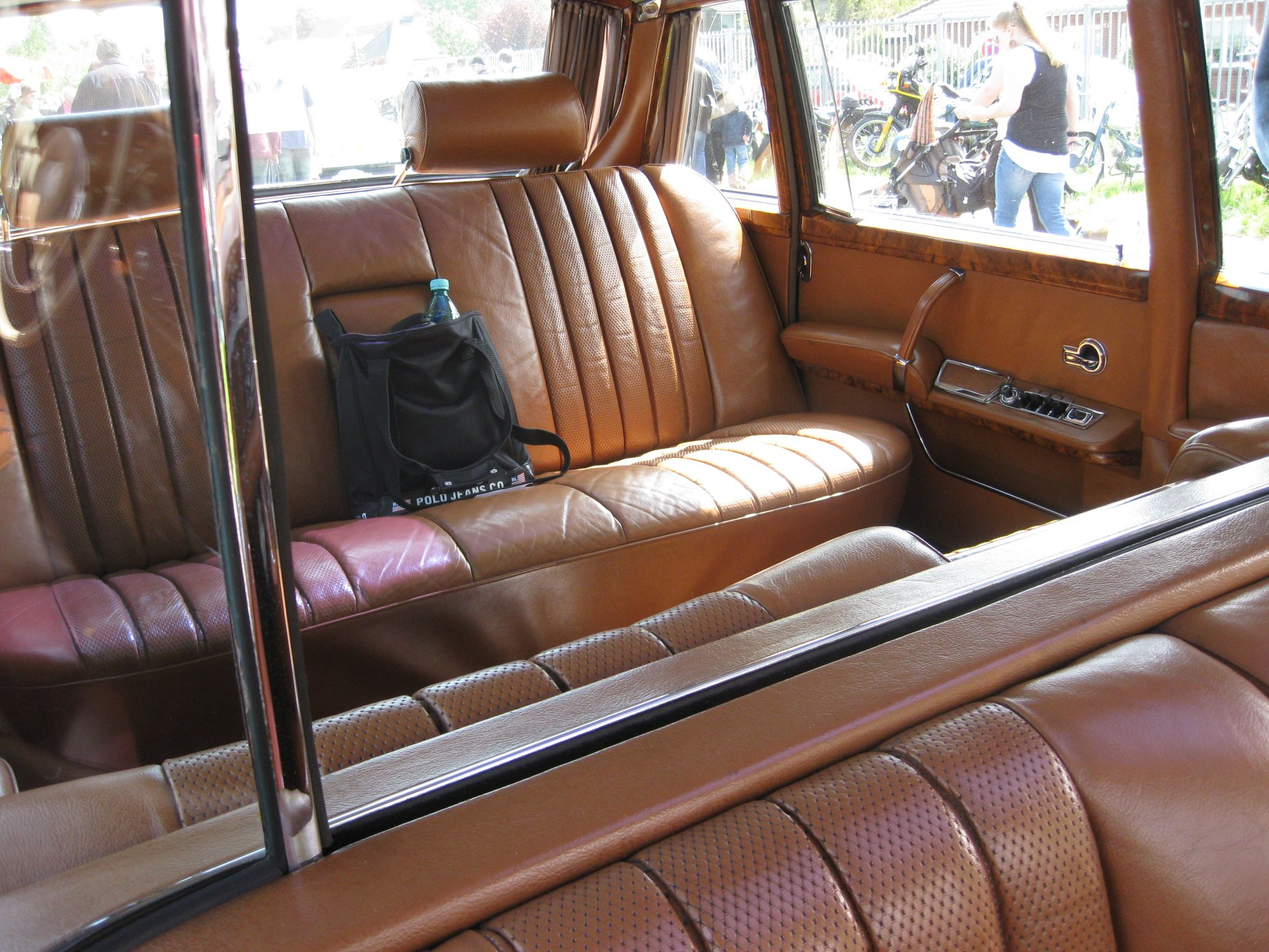 Blick auf die Rückbänke des Pullman